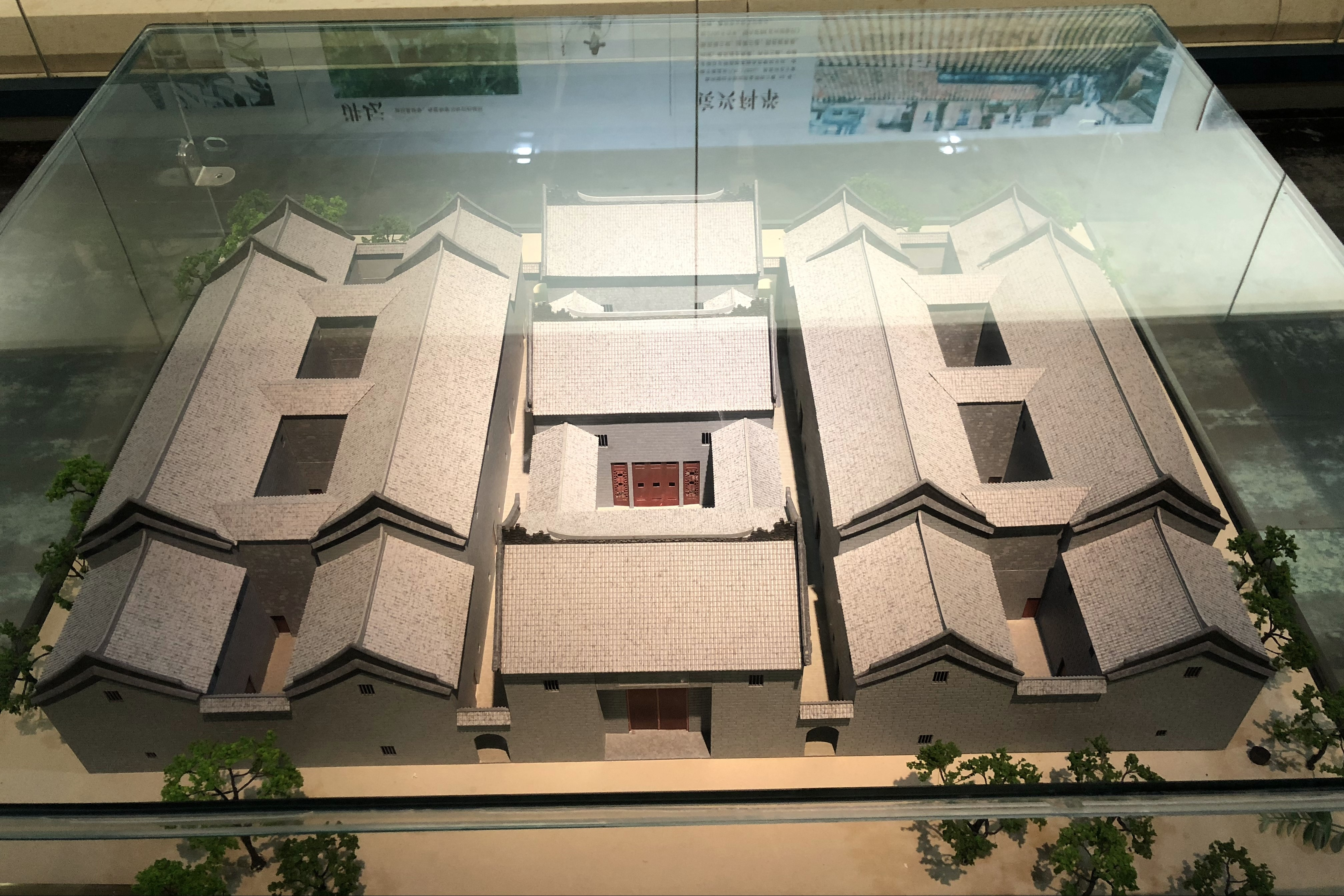 中文（中国大陆）: 宾兴馆 模型